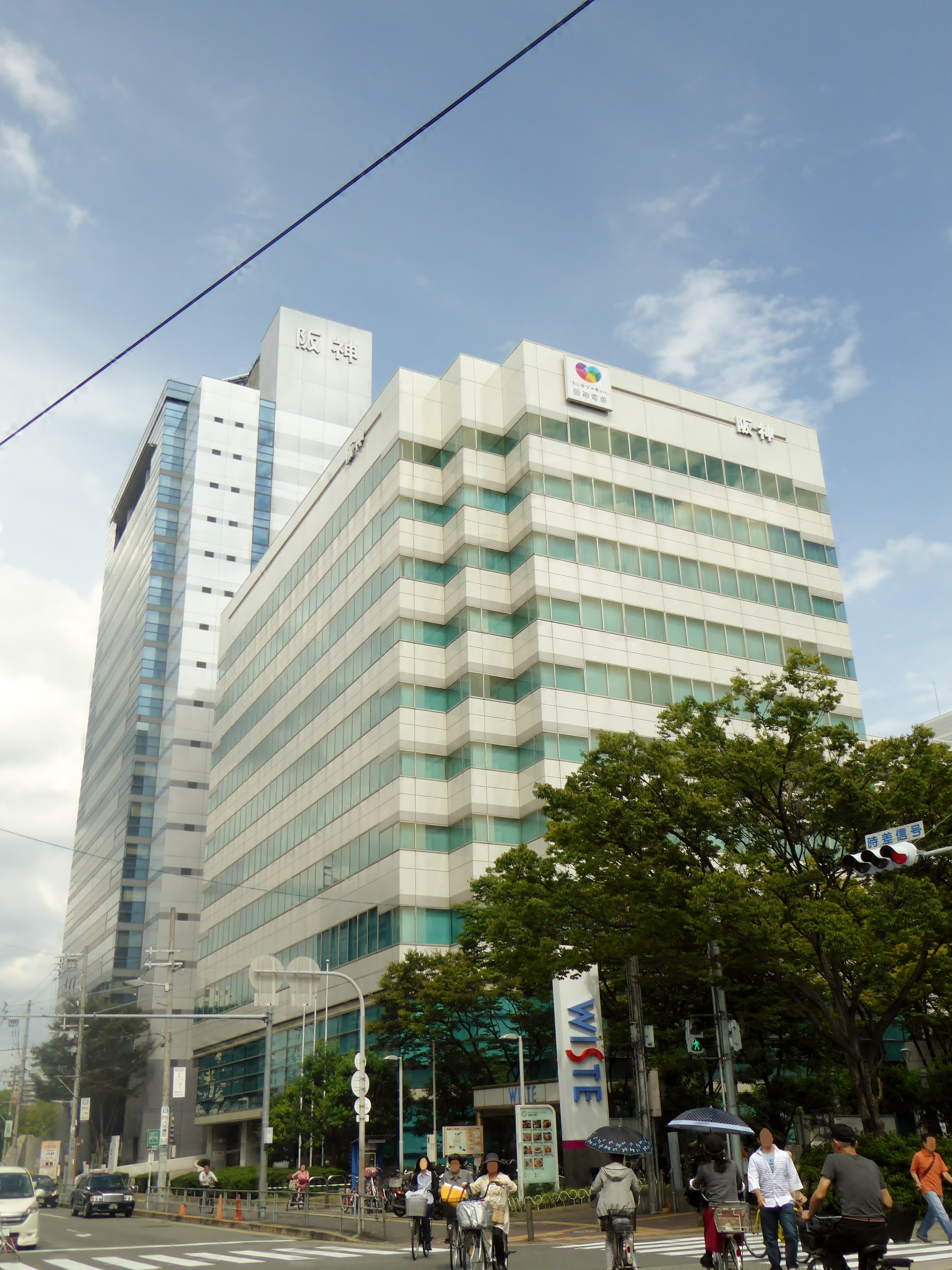 阪神電気鉄道株式会社本社を撮影。